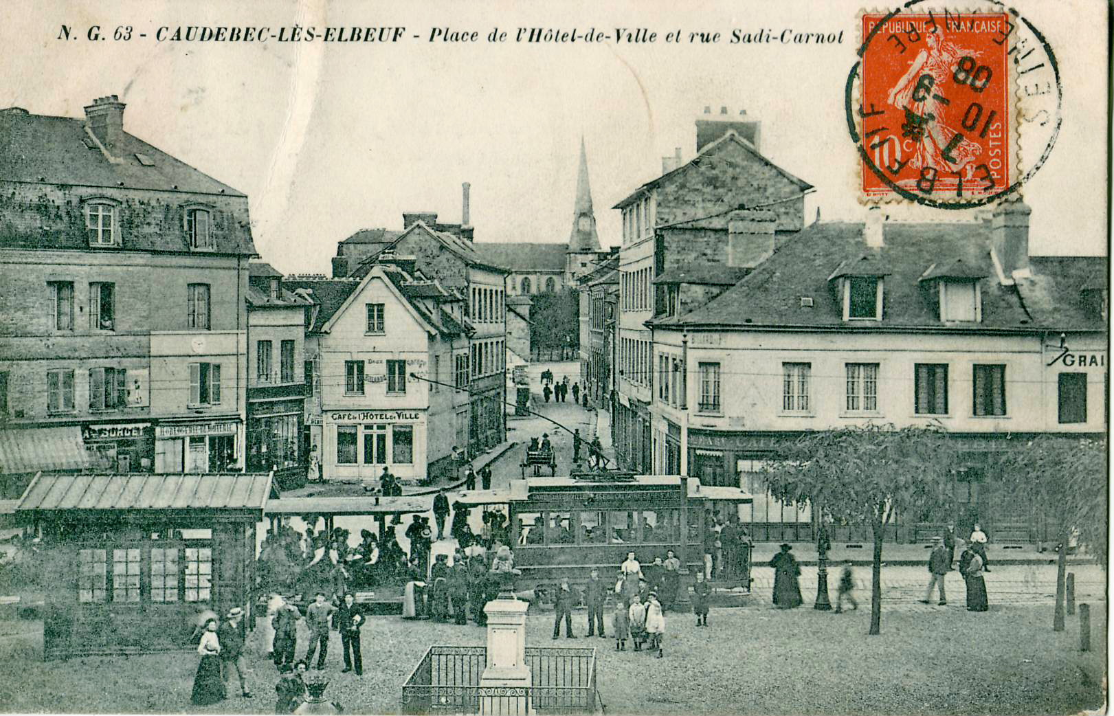 Carte postale ancienne éditée par N. G. n°63Caudebec-lès-Elbeuf - Place de l'Hôtel-de-Ville et rue Sadi-CarnotVue en gros plan d'une rame de la ligne 2 du Tramway d'Elbeuf